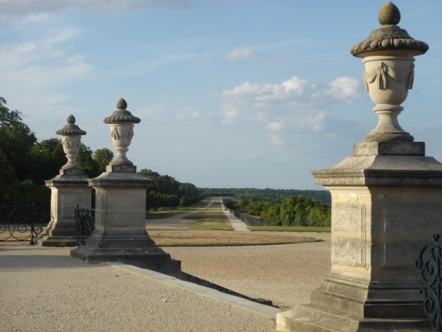 Terrasse du château de Saint-Germain-en-Laye, vue en enfilade depuis Saint-Germain vers Maisons-Laffitte.